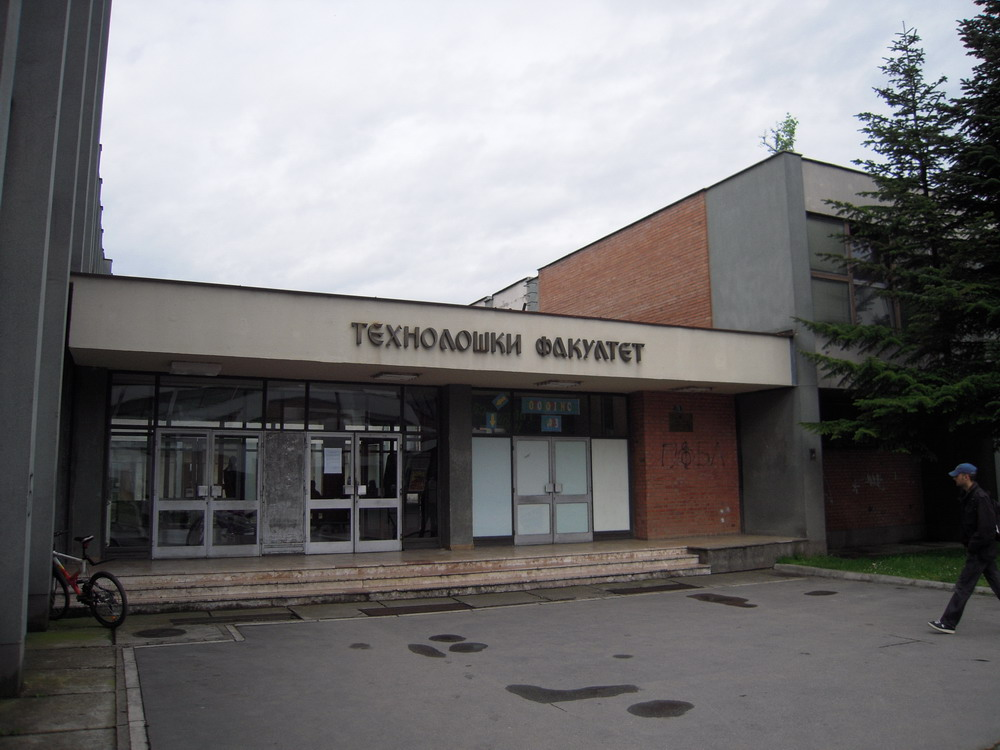 Tehnološki_fakultet_(Banja_Luka)